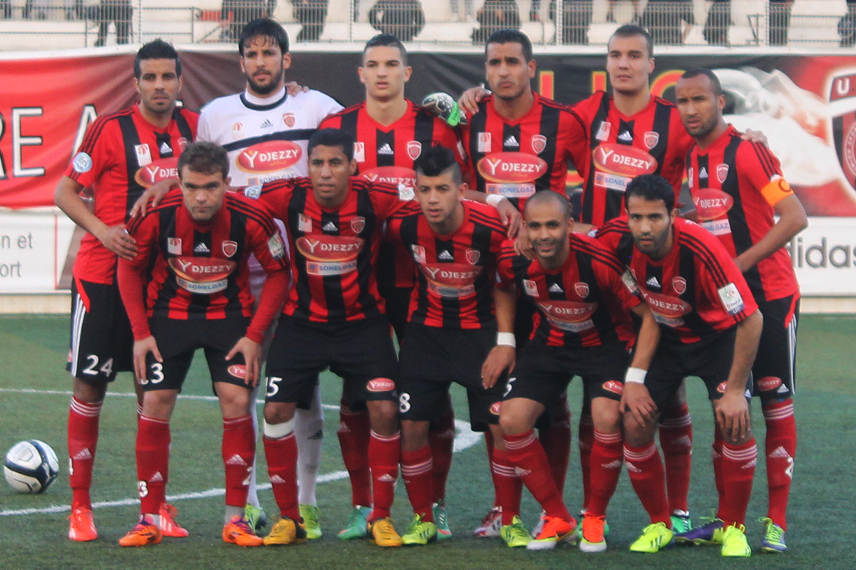 Photo d'équipe de l'USM Alger avant un match de Ligue 1 contre l'USM El Harrach au stade Omar-Hamadi le 15 février 2014. Debout de gauche à droite : Benamara, Zemmamouche, Ferhat, Ziaya, Bouchema, Khoualed. Accroupis de gauche à droite : Koudri, Feham, Baïteche, Benmoussa, Laïfaoui.